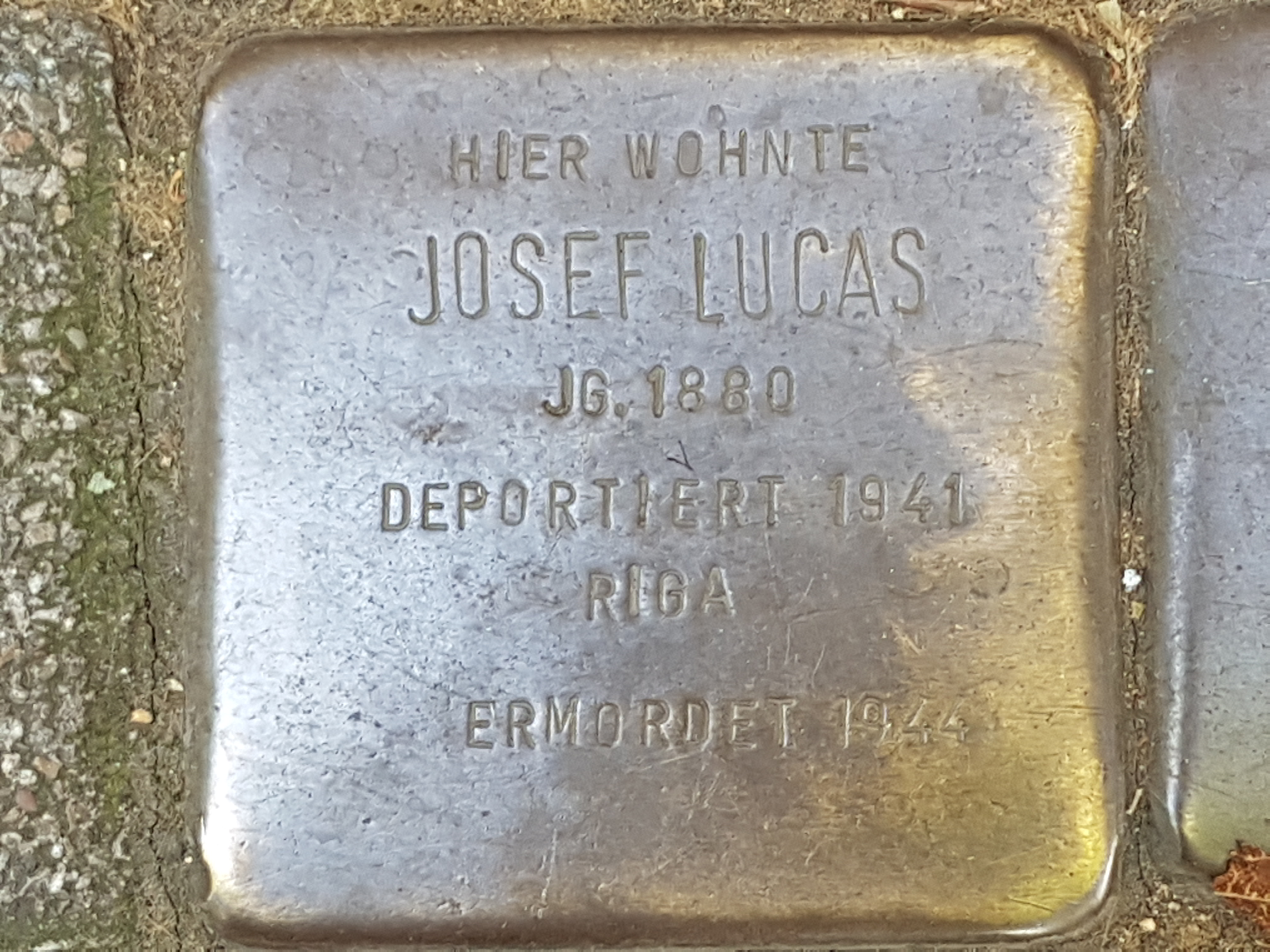 Stolperstein Duisburg